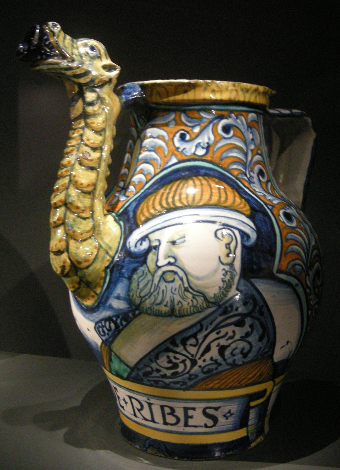 Ngv, maiolica di castelli (pompei), vaso per sciroppo di ribes, 1530-65